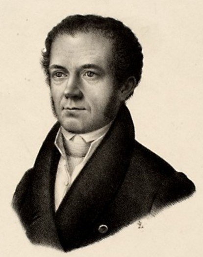 Depicted person: Franz Ferdinand Schweins, 1810–1856 Privatdozent und Professor für Mathematik in Heidelberg